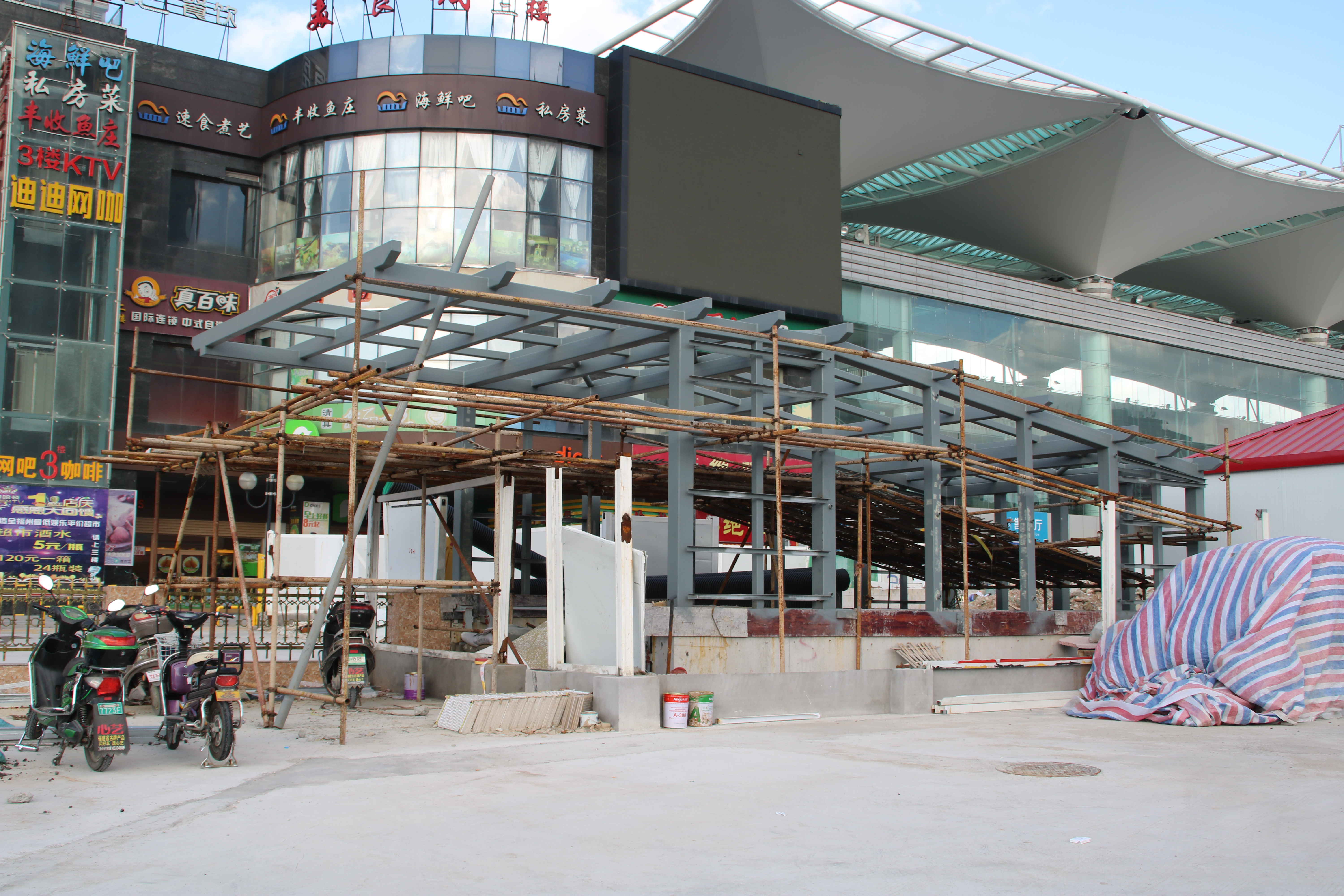 在建福州火车站站E出入口